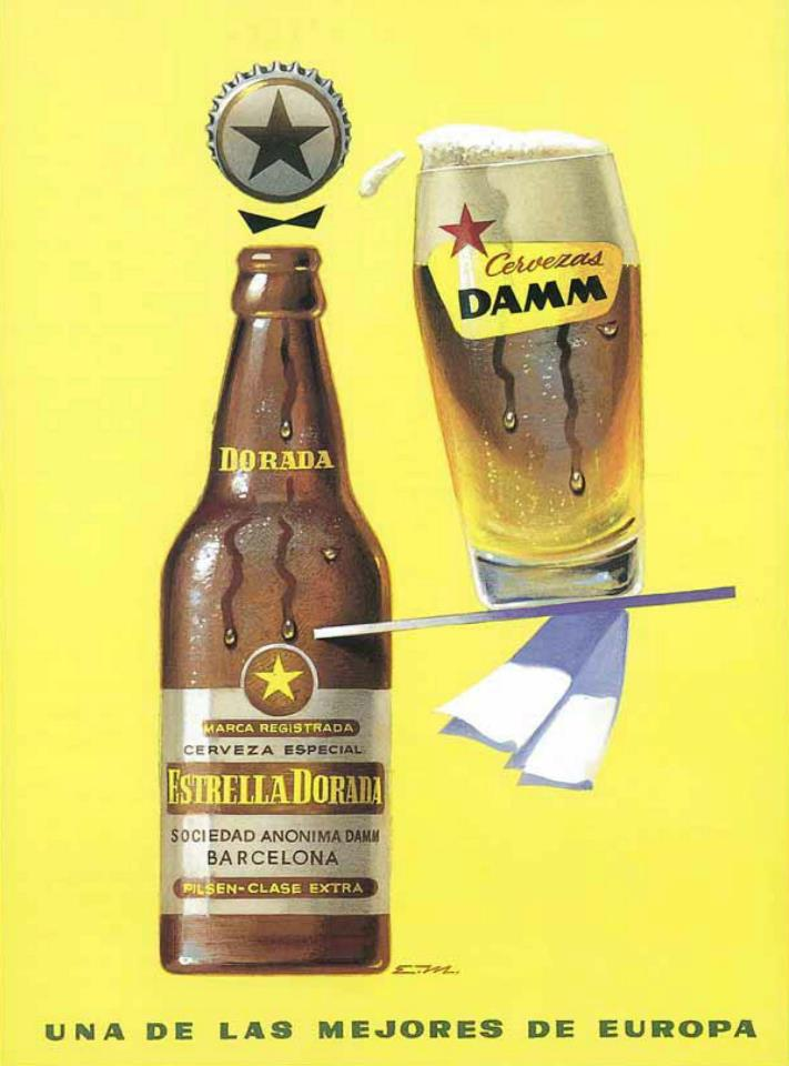 Anuncio de Estrella Dorada